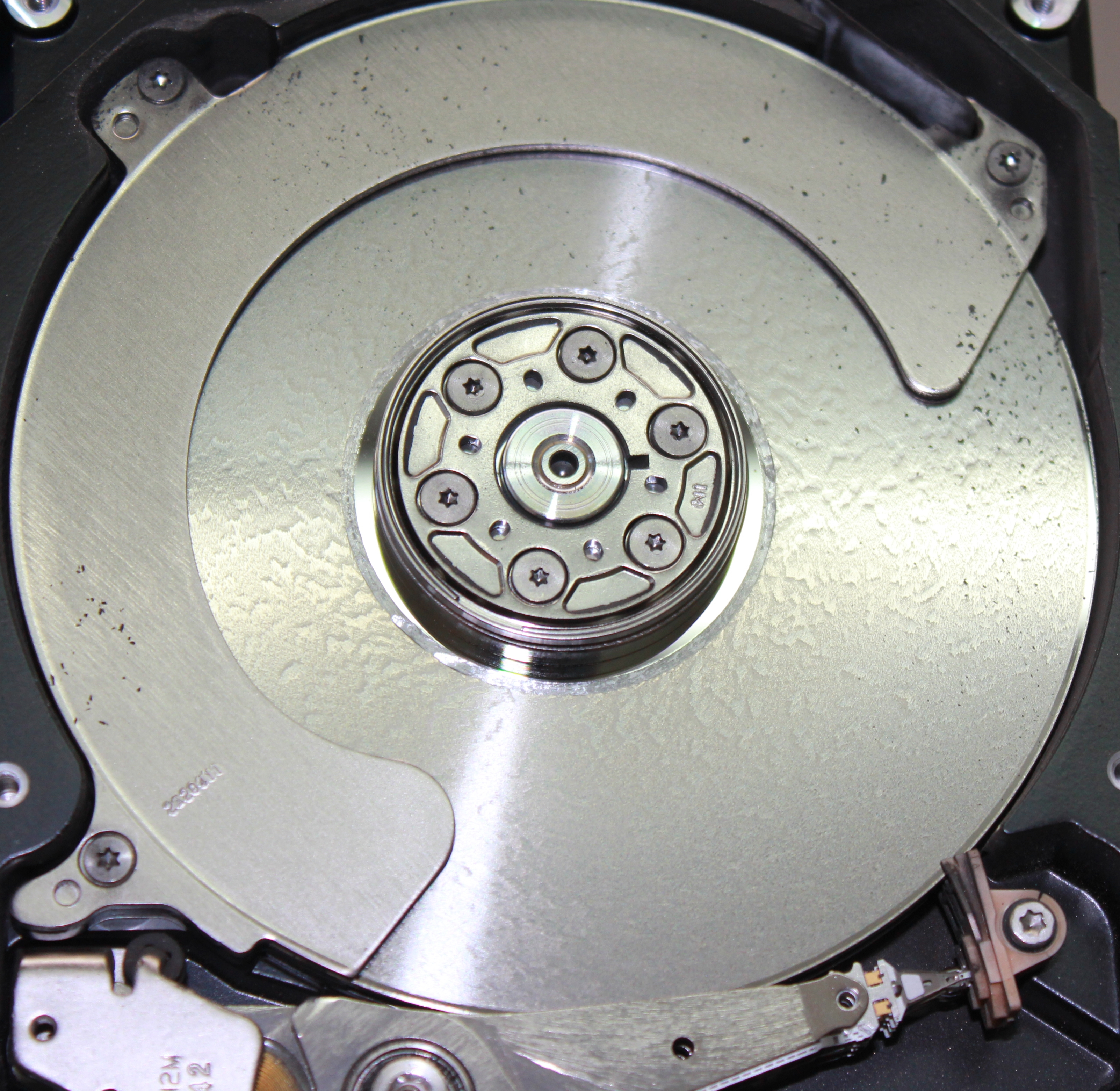 Zerstörte Datenplatten nach einem Festplatten-Headcrash